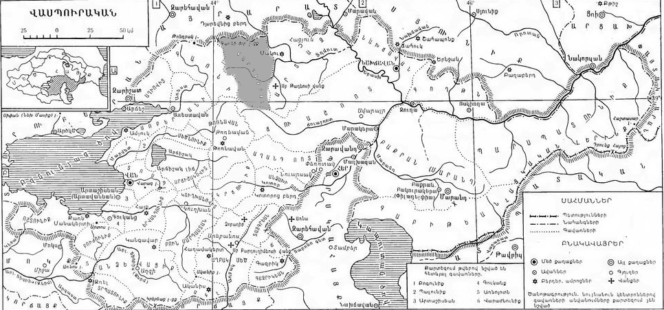 Վասպուրական